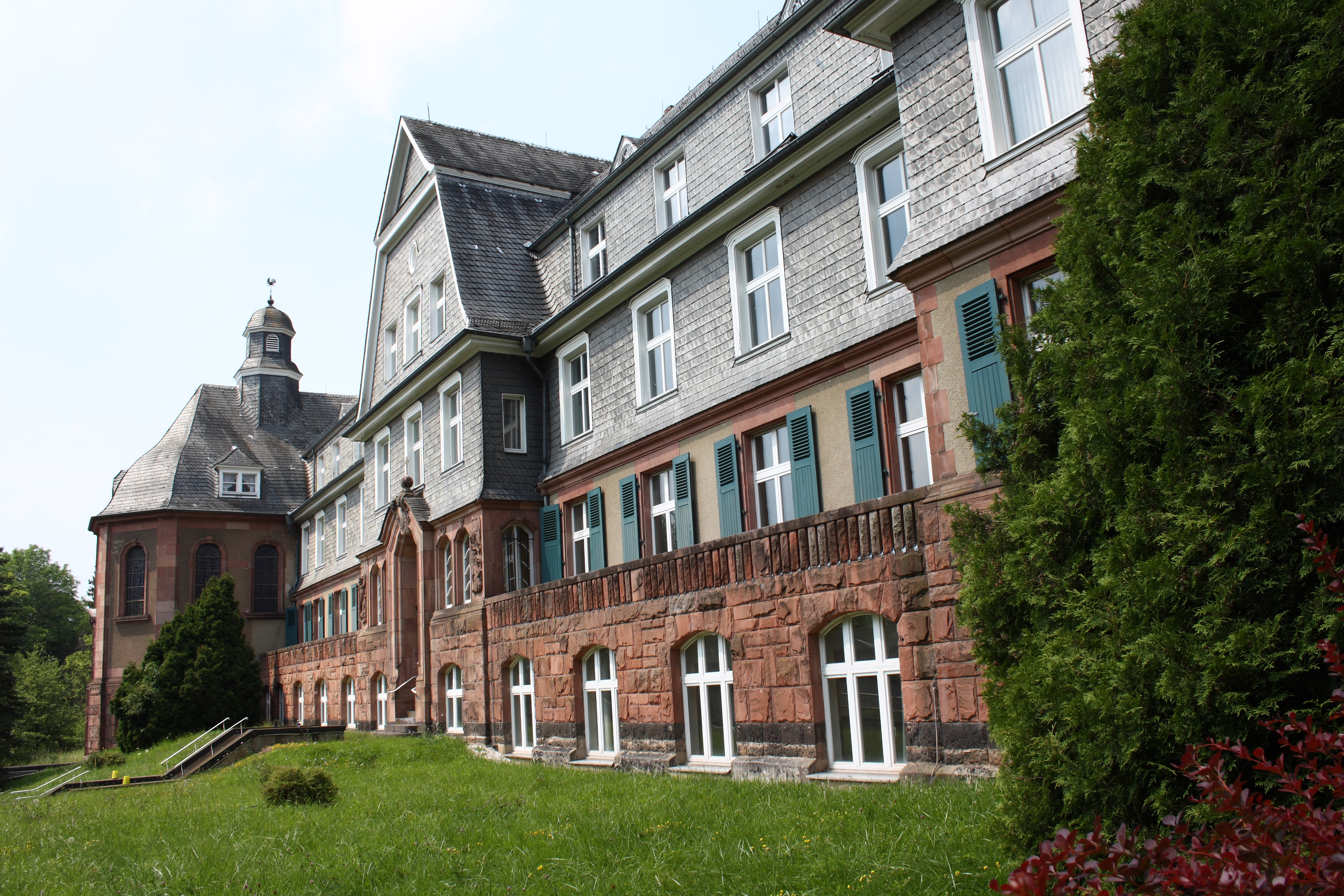 Kloster Haus Tannenblick in Nettersheim im Kreis Euskirchen (Nordrhein-Westfalen), Klosterstraße 12; auch als Herz-Jesu-Kloster bezeichnet